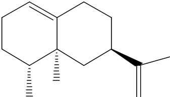 Valencene